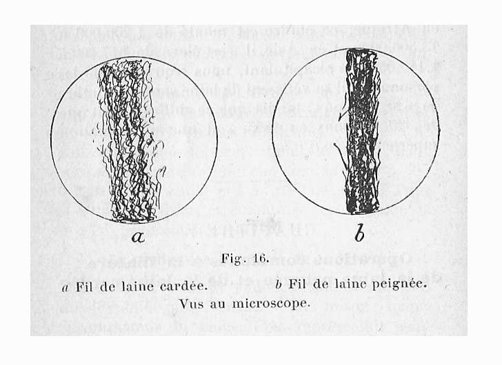 Comparaison entre la laine peignée et la laine cardée